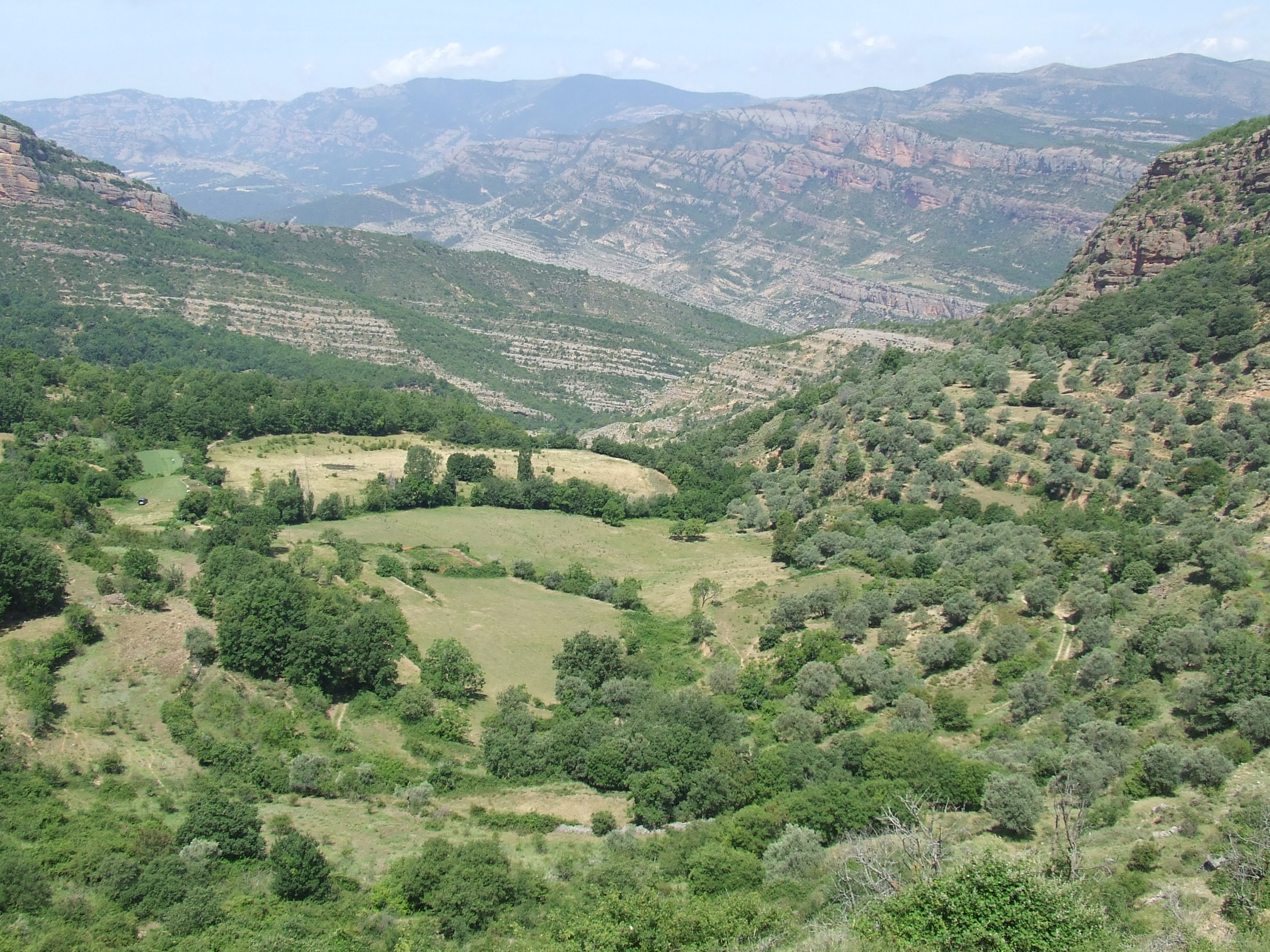 El Barranc de Llabro (Claverol i Hortoneda de la Conca, Conca de Dalt, Pallars Jussà)